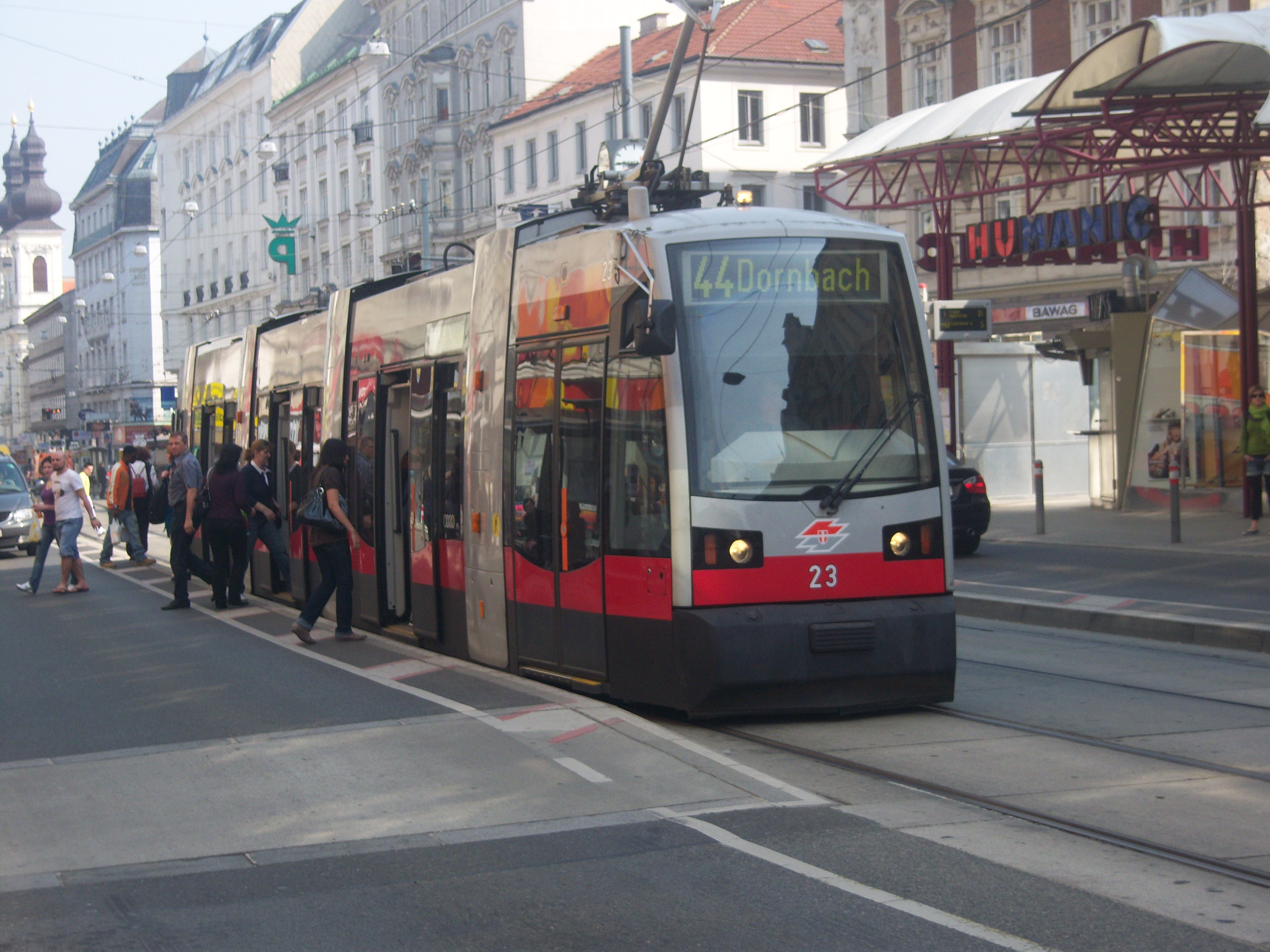 Zug der Linie 44 in der Alser Straße